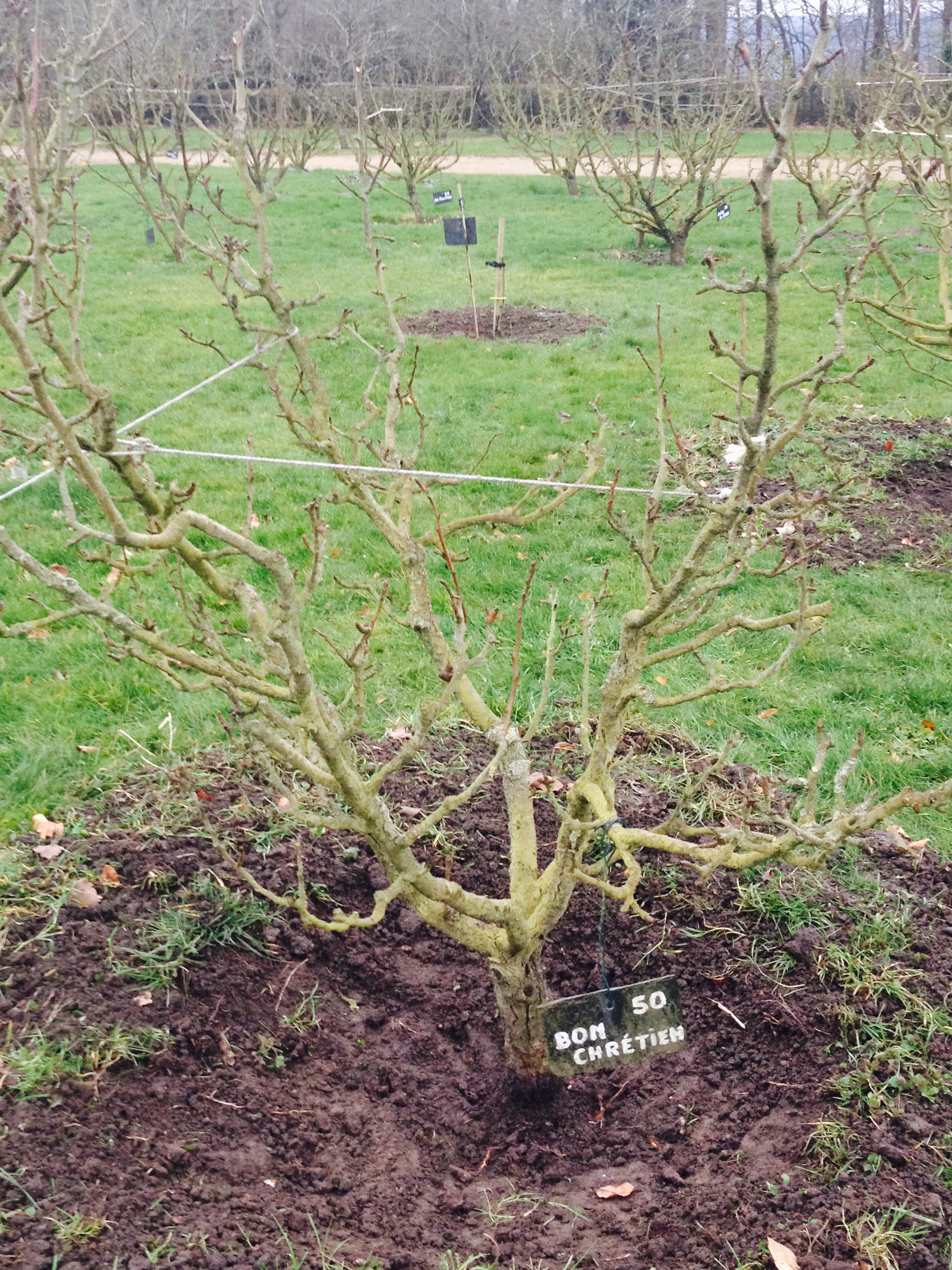 Pommier